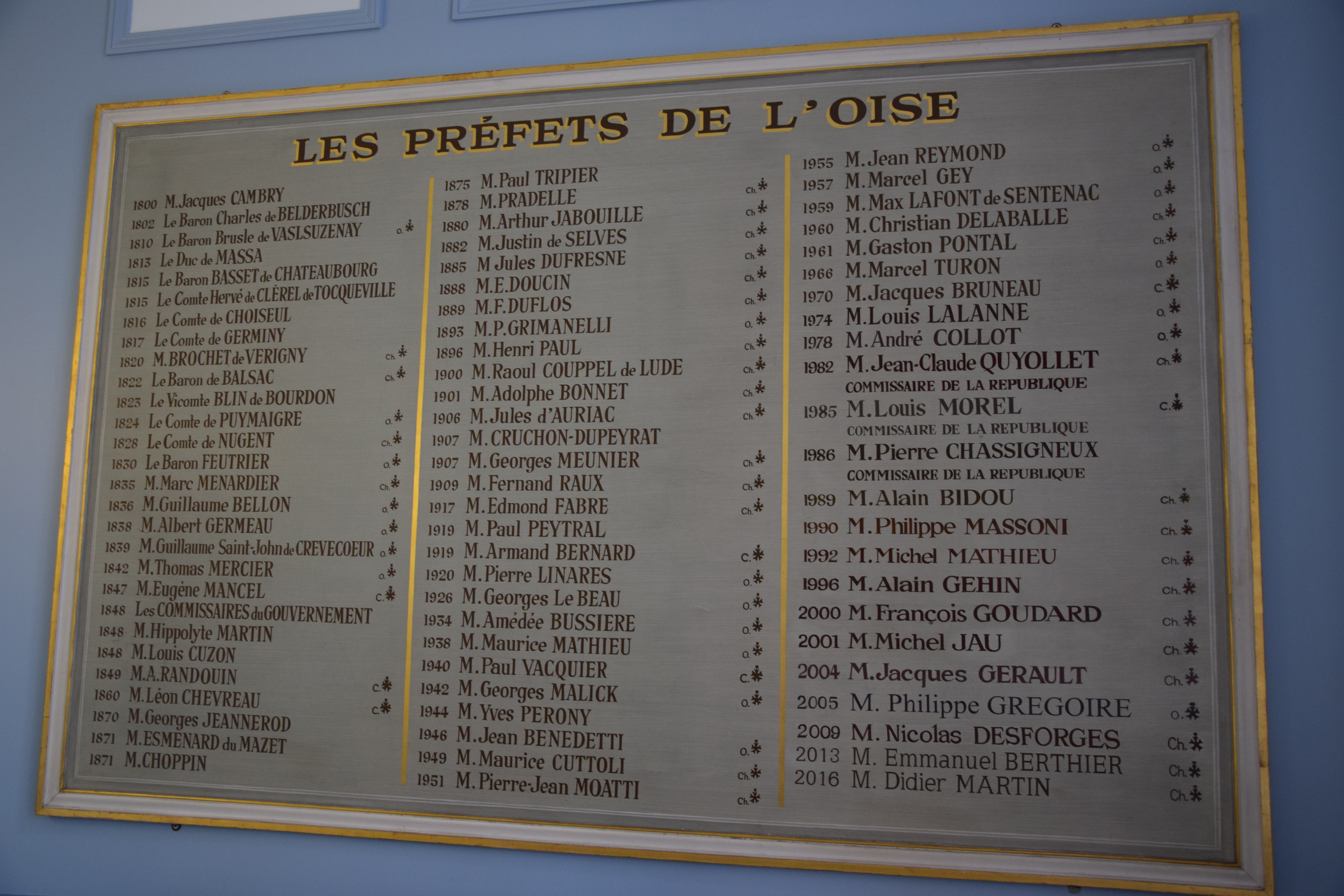 Préfecture de Beauvais, Abbaye Saint-Quentin